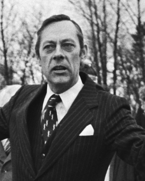 Burgemeester Reijnen (Heerlen) biedt Madurodam model Romeinse Thermen aan; burgemeester Reijnen temidden van Romeinen